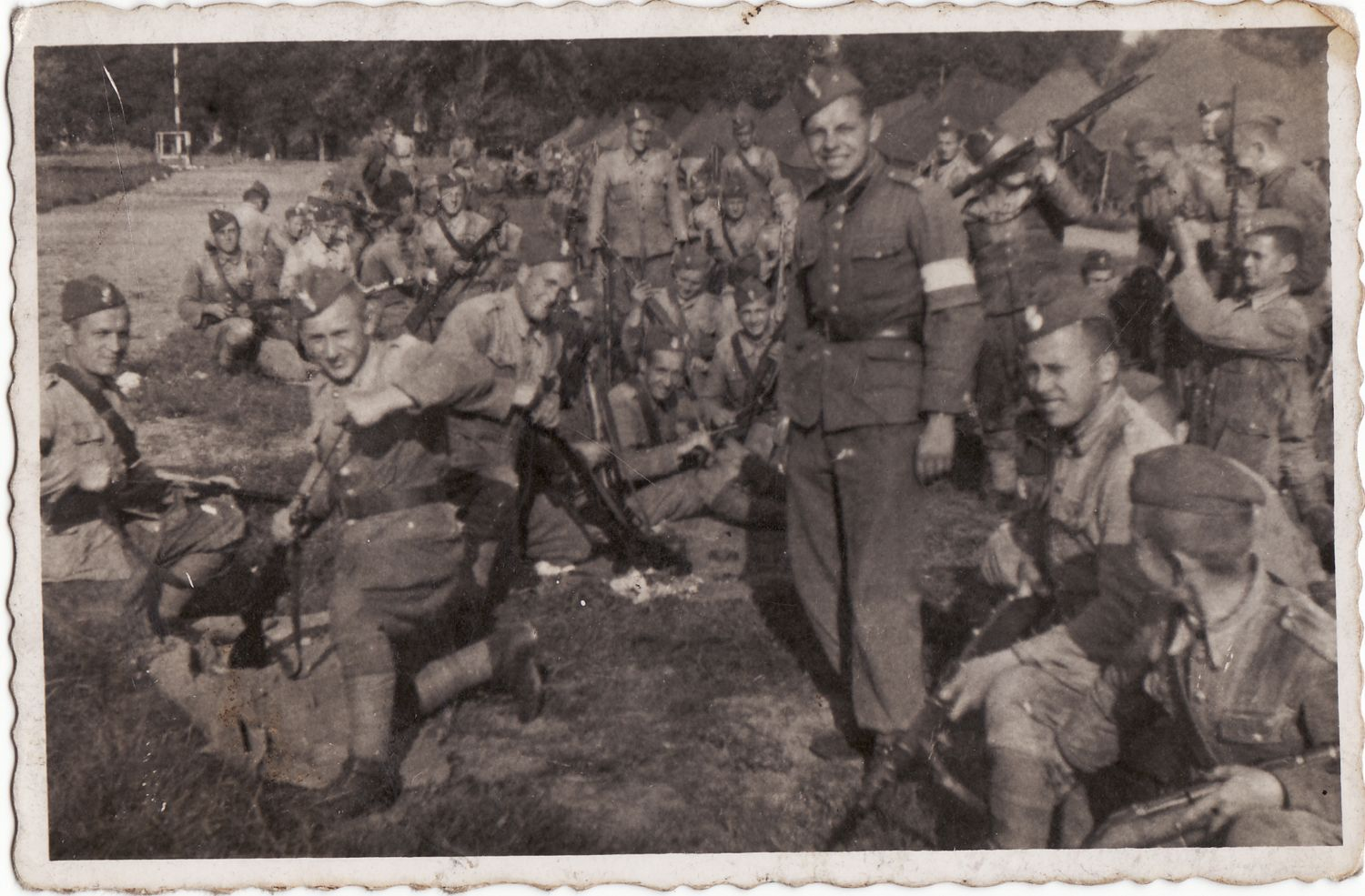 Żołnierze kadry 9 batalionu pancernego